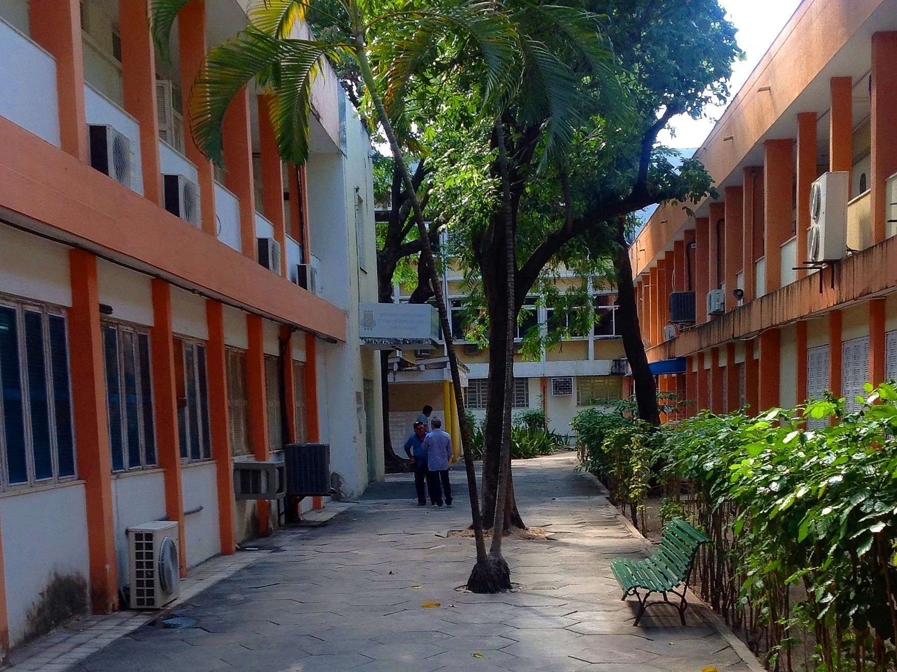 Área III do Centro de Humanidades da Universidade Federal do Ceará